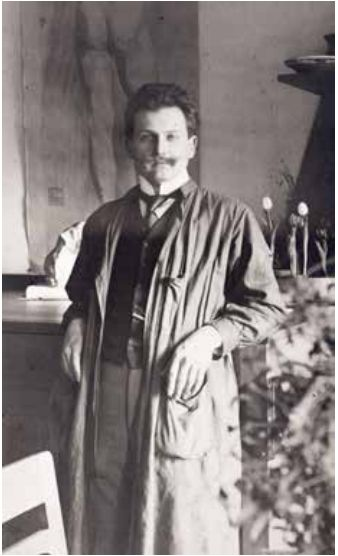 Leopold Blauensteiner (1880 –1947)